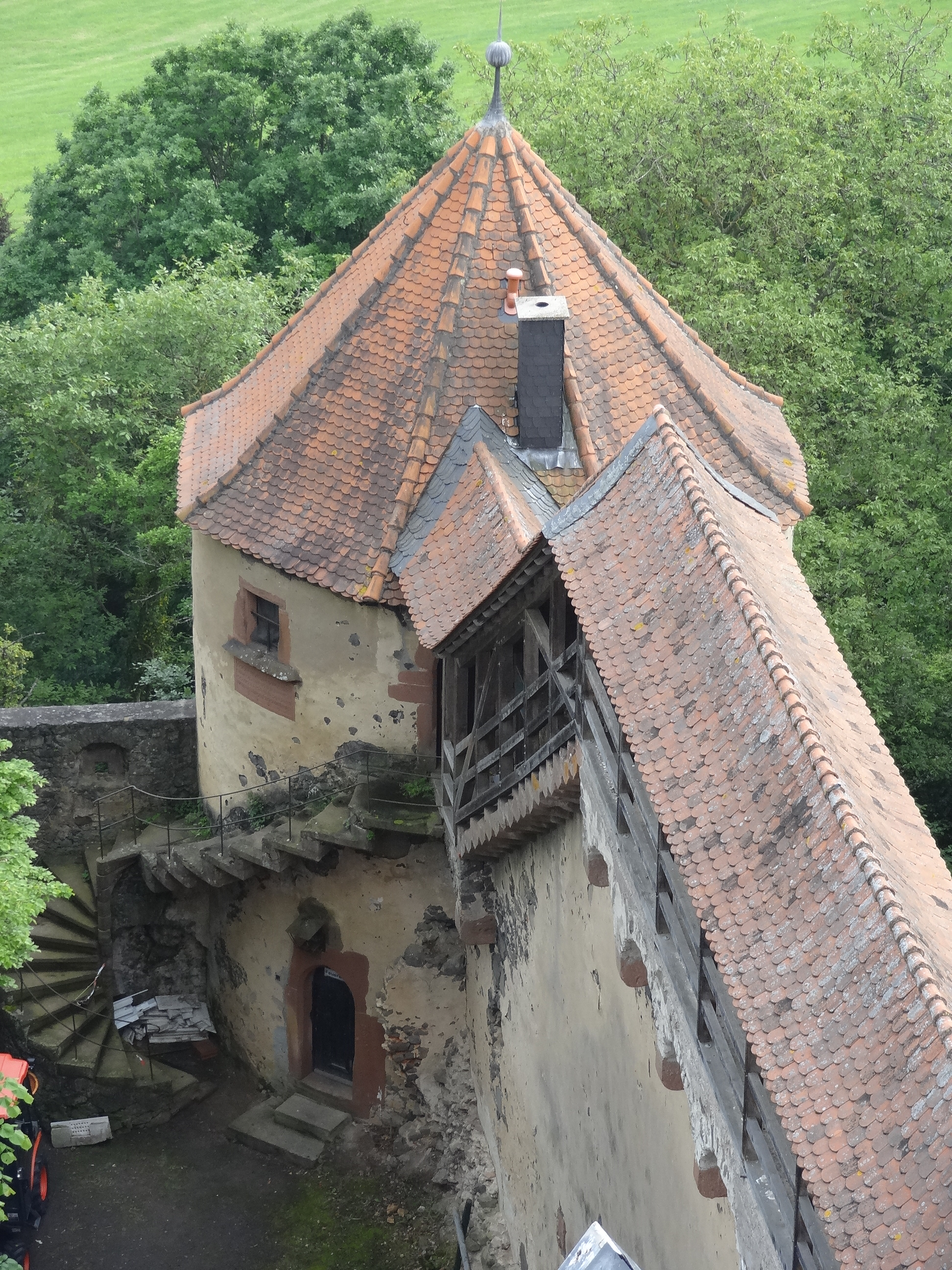 Burg Ronneburg (Hesse)